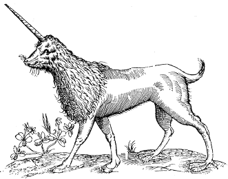 Le campruch (ou camphur), licorne aquatique décrite dans le bestiaire "Monstrorum historiae"